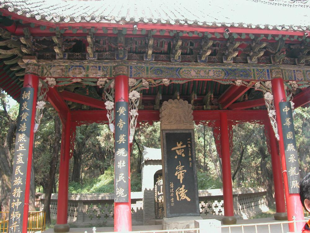 Cncszh:2005年zh:9月11日，摄于zh:陕西zh:桥山zh:黄帝陵。